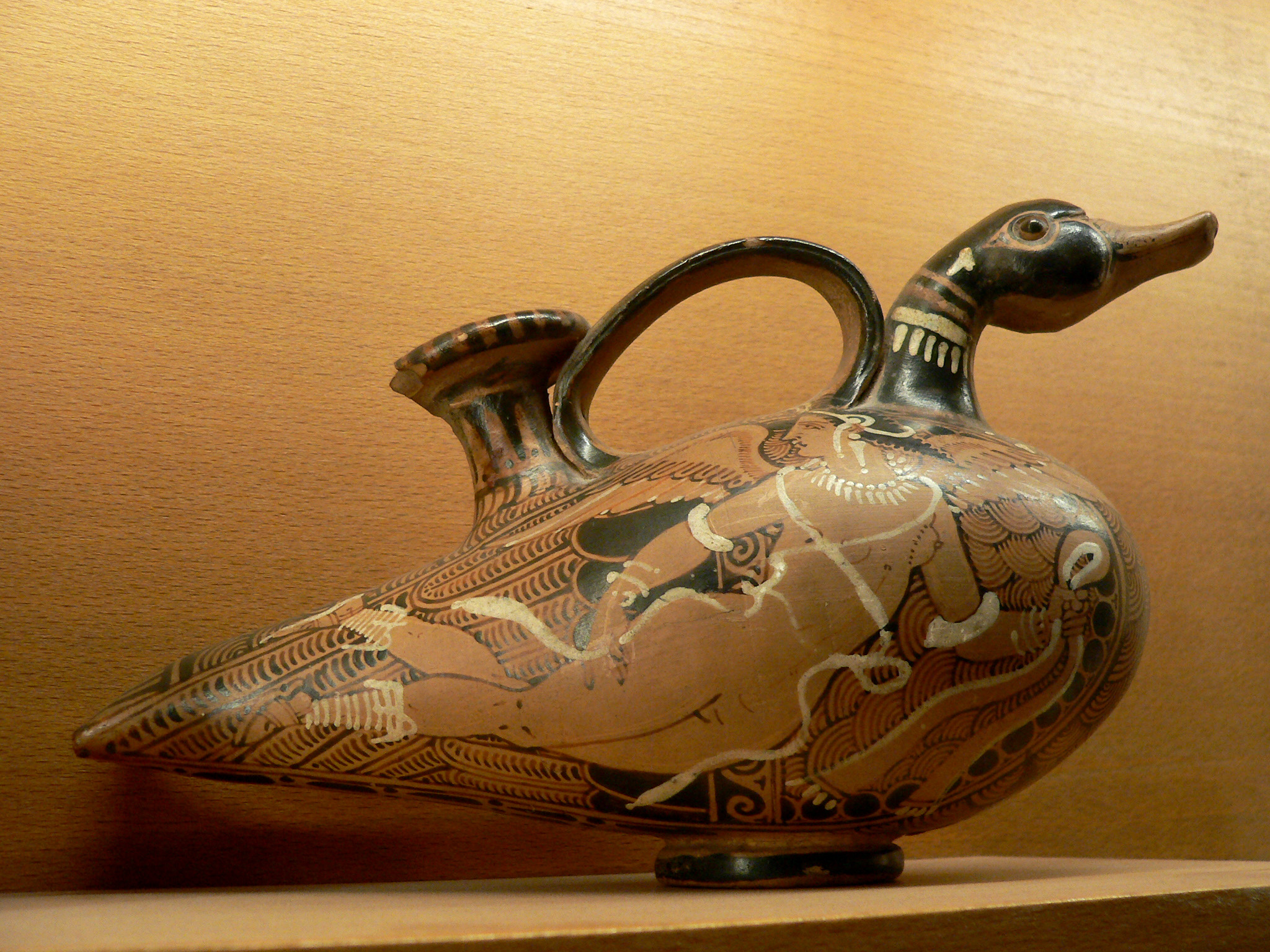 Vase plastique en forme de canard (askos). Art étrusque. Chiusi. Terre cuite. 11,5 x 19,5 cm. Décor polychrome : femmes nues volant au milieu de plumages stylisés.